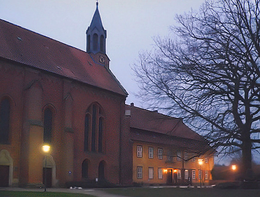 Kirche des Klosters Mariensee in Mariensee